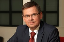 Minister van Onderwijs, Cultuur en Wetenschap André Rouvoet